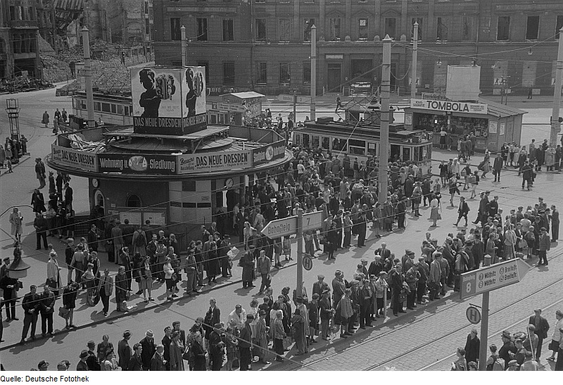 Original image description from the Deutsche FotothekStraßenbahnhaltestellen mit Wartehalle (sog. "Käseglocke") gegen Ruine des Hauptpostamtes